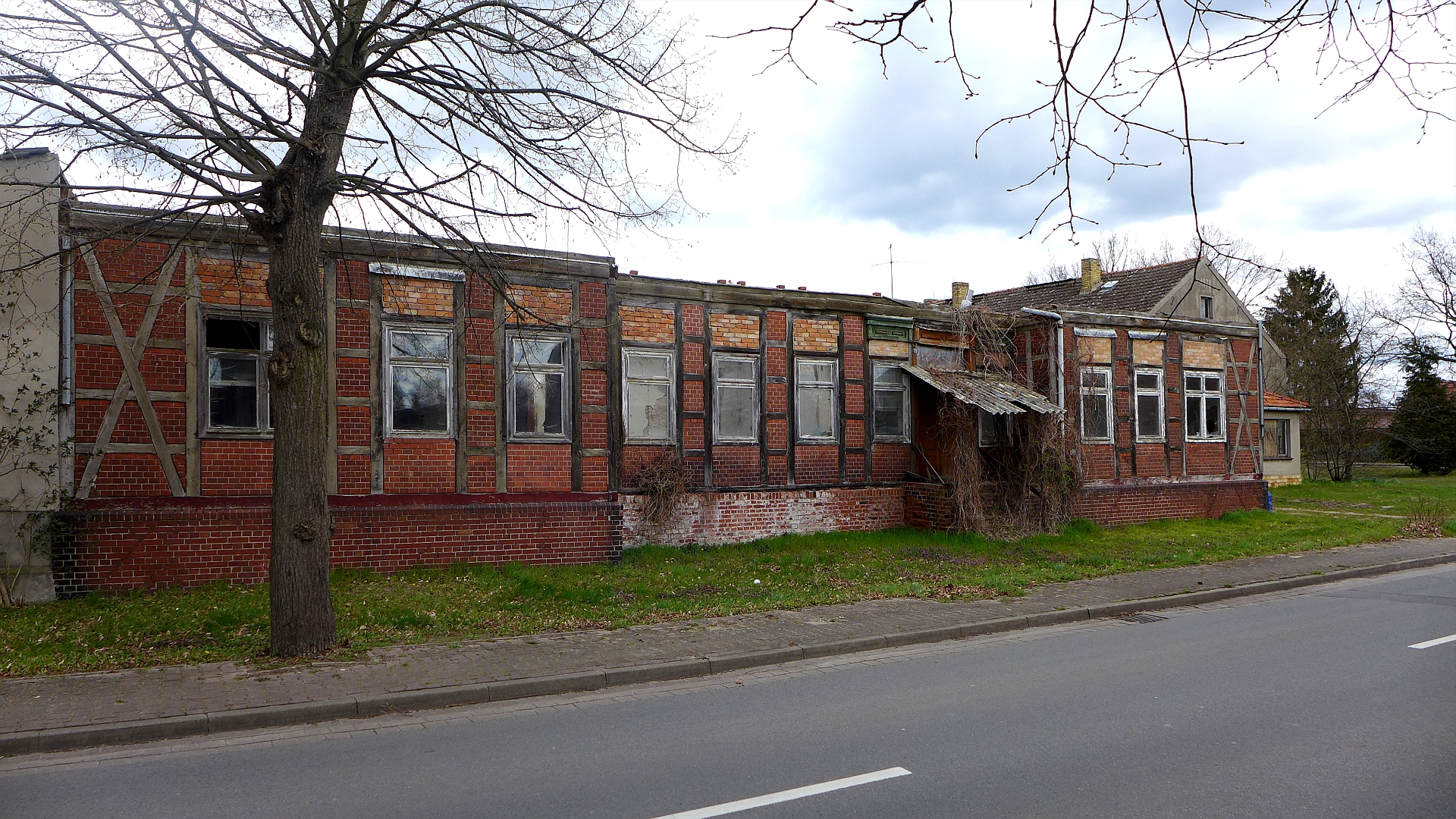 Ruine eines landwirtschaftlichen Anwesens in der Ritzer Dorfstraße, Ritze, Ortsteil von Salzwedel. Aufnahmedatum 2015-04.